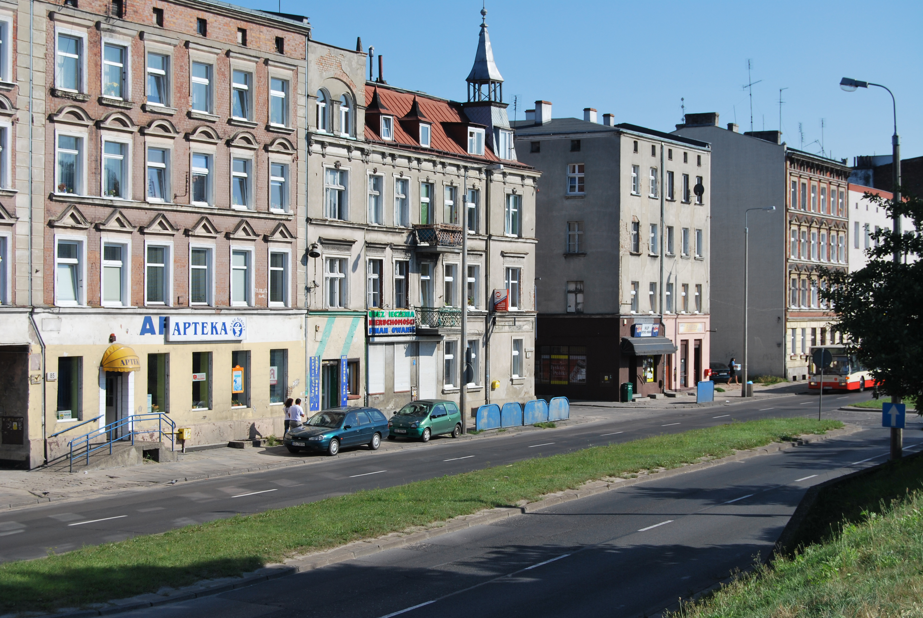 Gdańsk Orunia; Trakt św. Wojciecha (2009 r.).